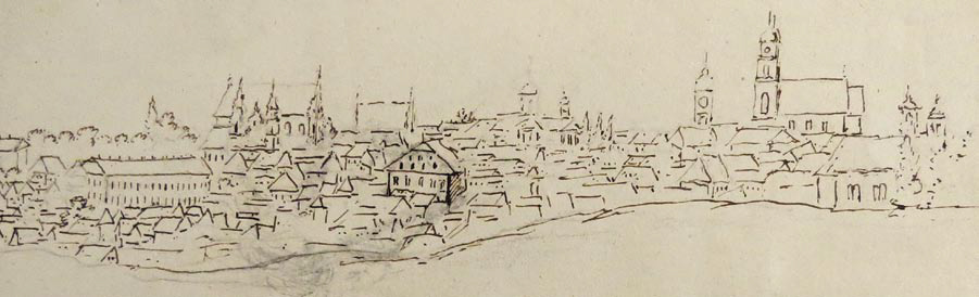 Беларуская (тарашкевіца): Менск (Miensk) з боку Людамонту (Ludamont)